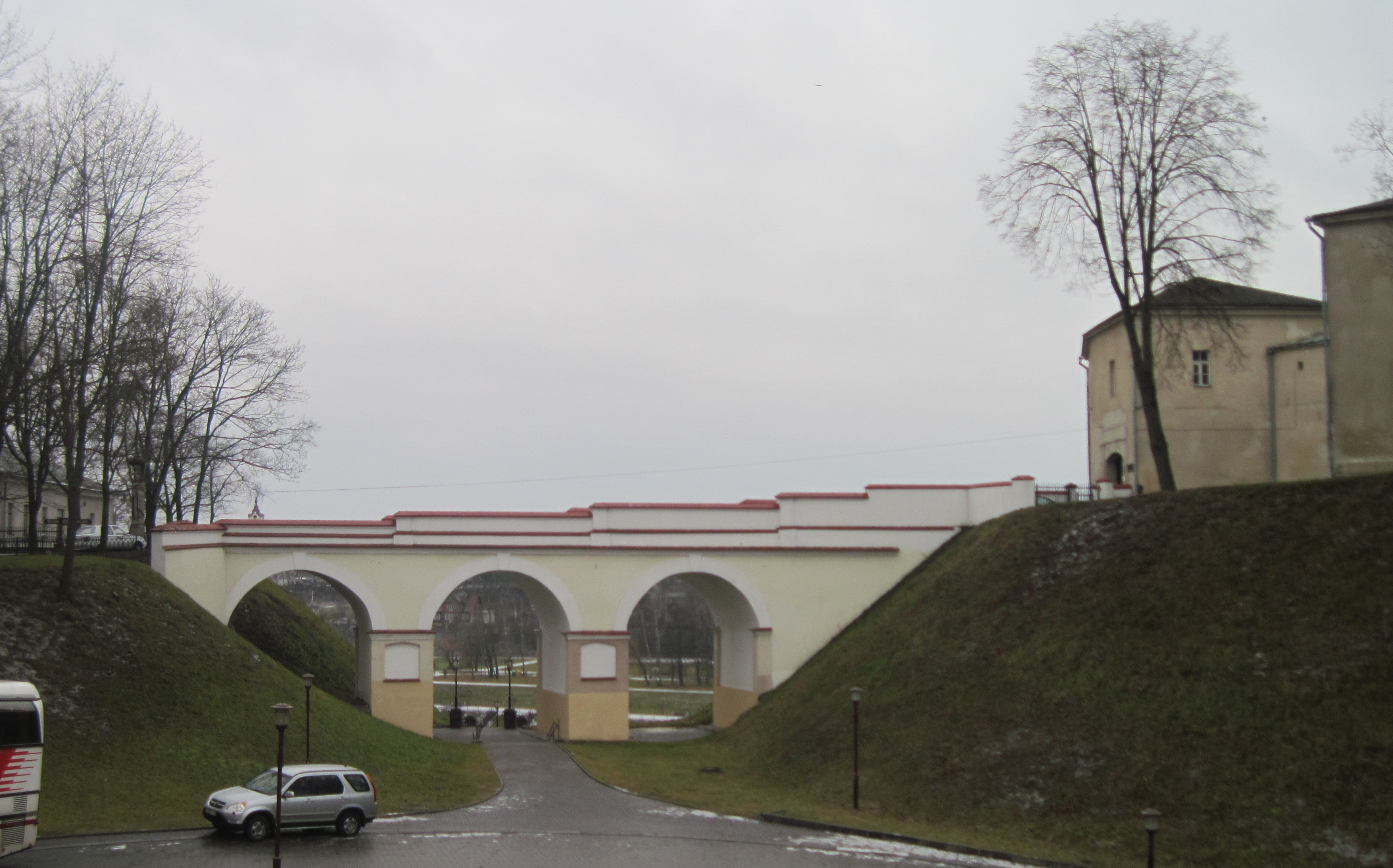 Беларуская (тарашкевіца): Мост у Стары Замак, Гродна